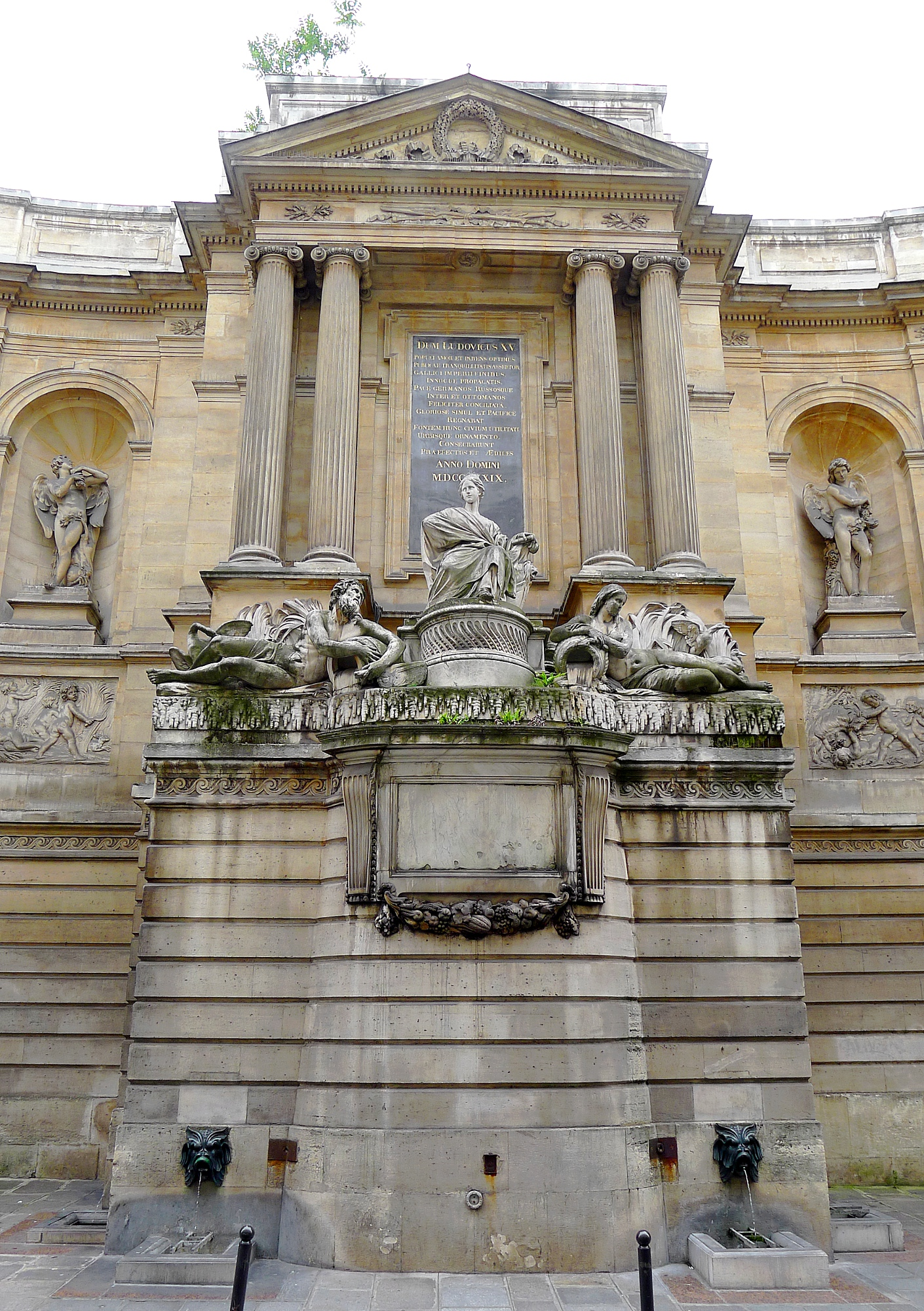 Rue de Grenelle (n°57, 59), fontaine des Quatre-Saisons - Paris VII